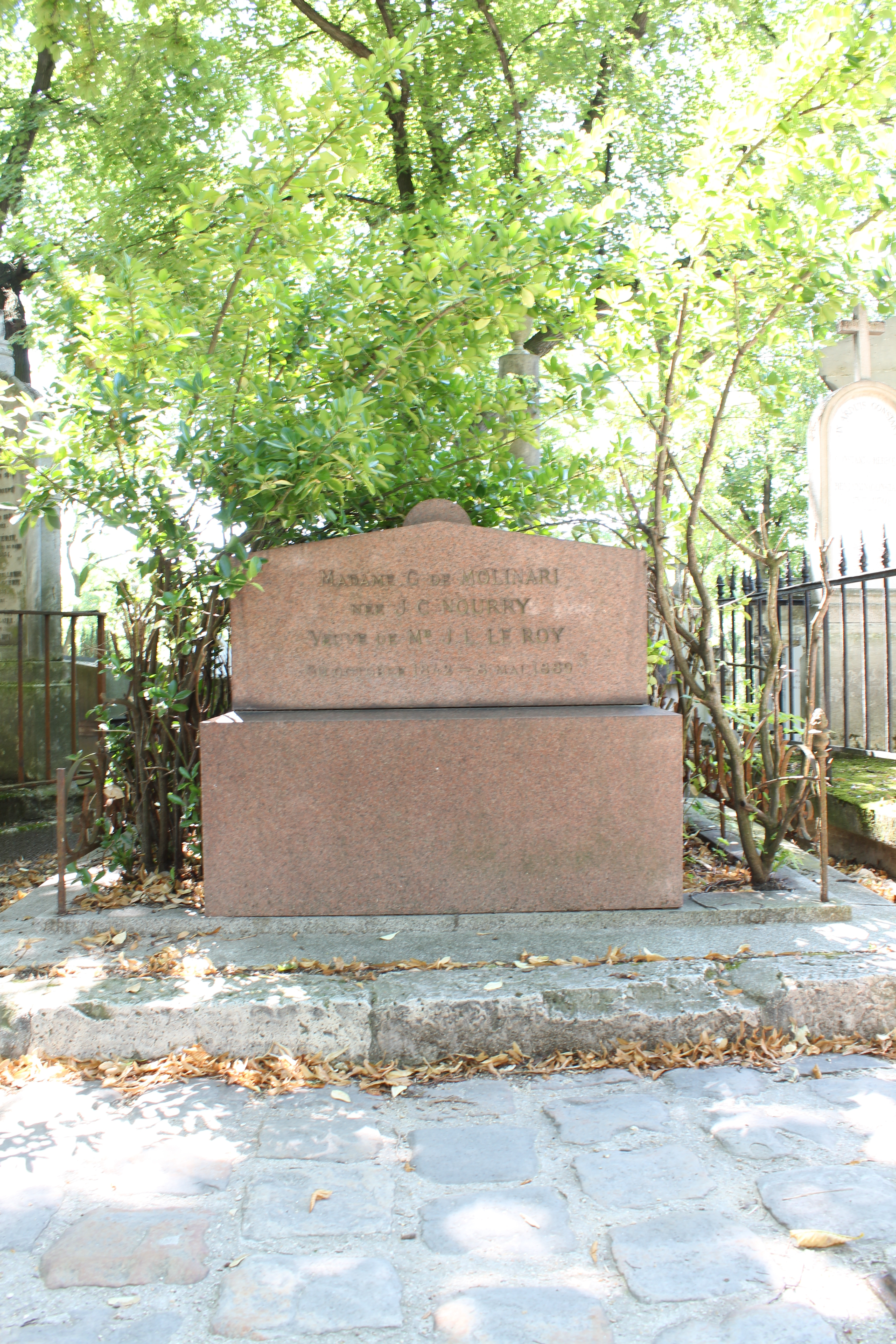 Vue d'ensemble